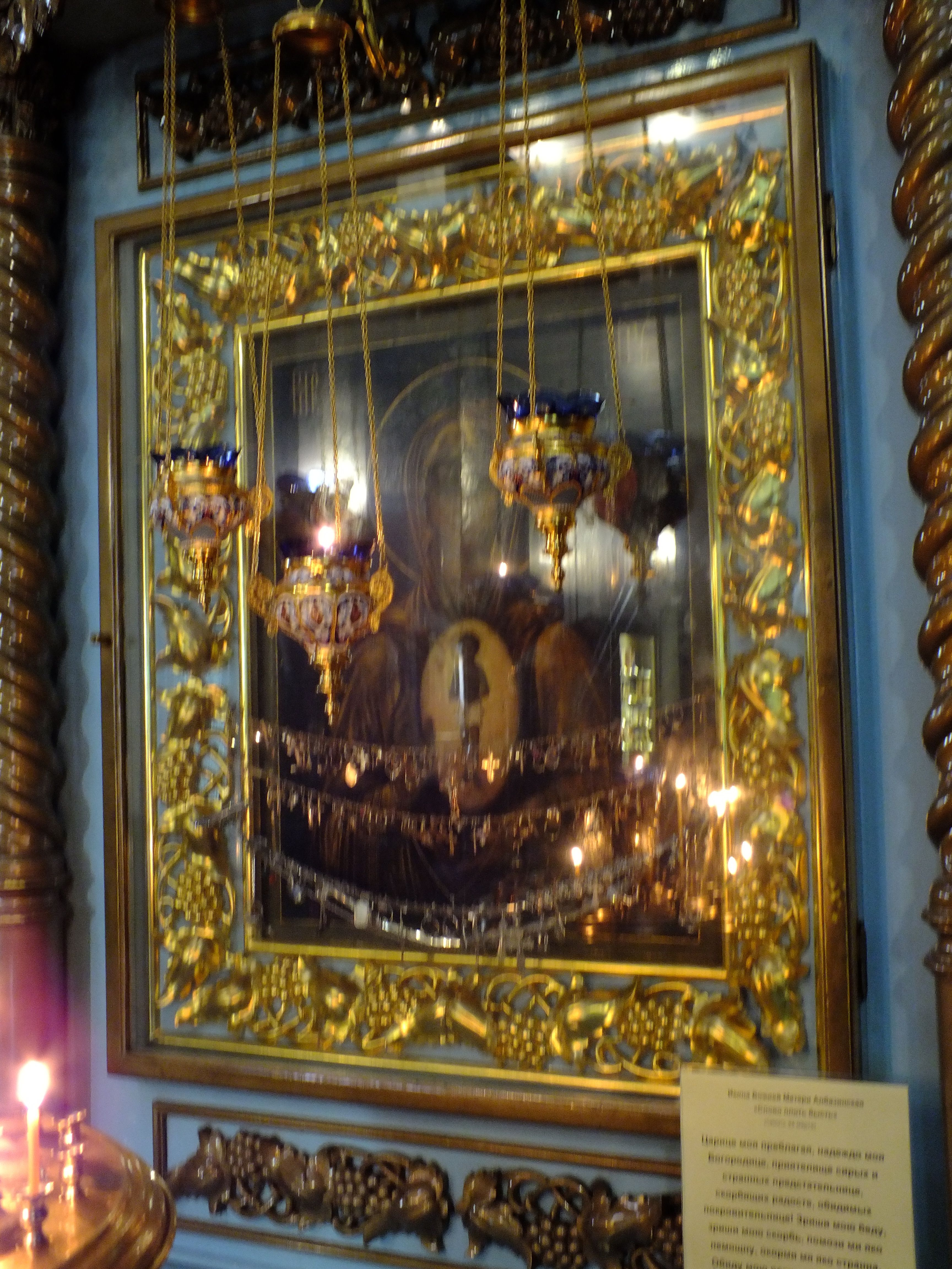 Church of the Dormition of the Theotokos (Khabarovsk)